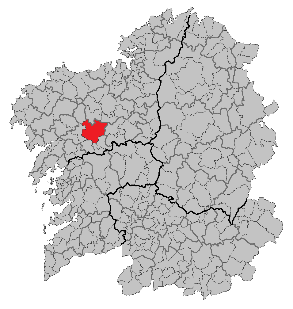 Mapa coa localización do concello de Santiago de Compostela.